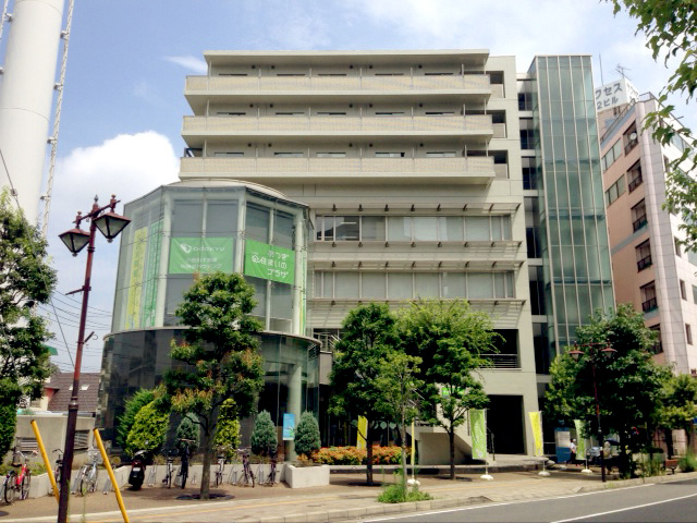 厚木アザレアビル